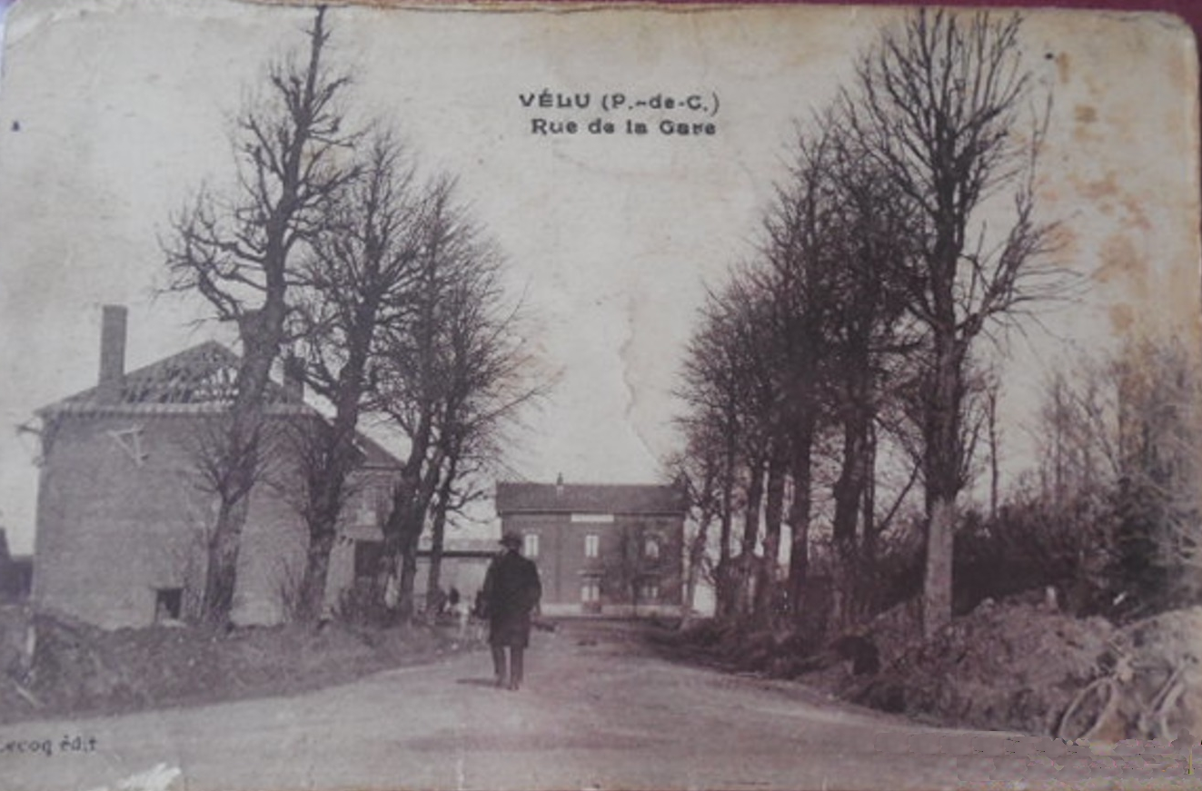 La gare de Vélu vers 1905.